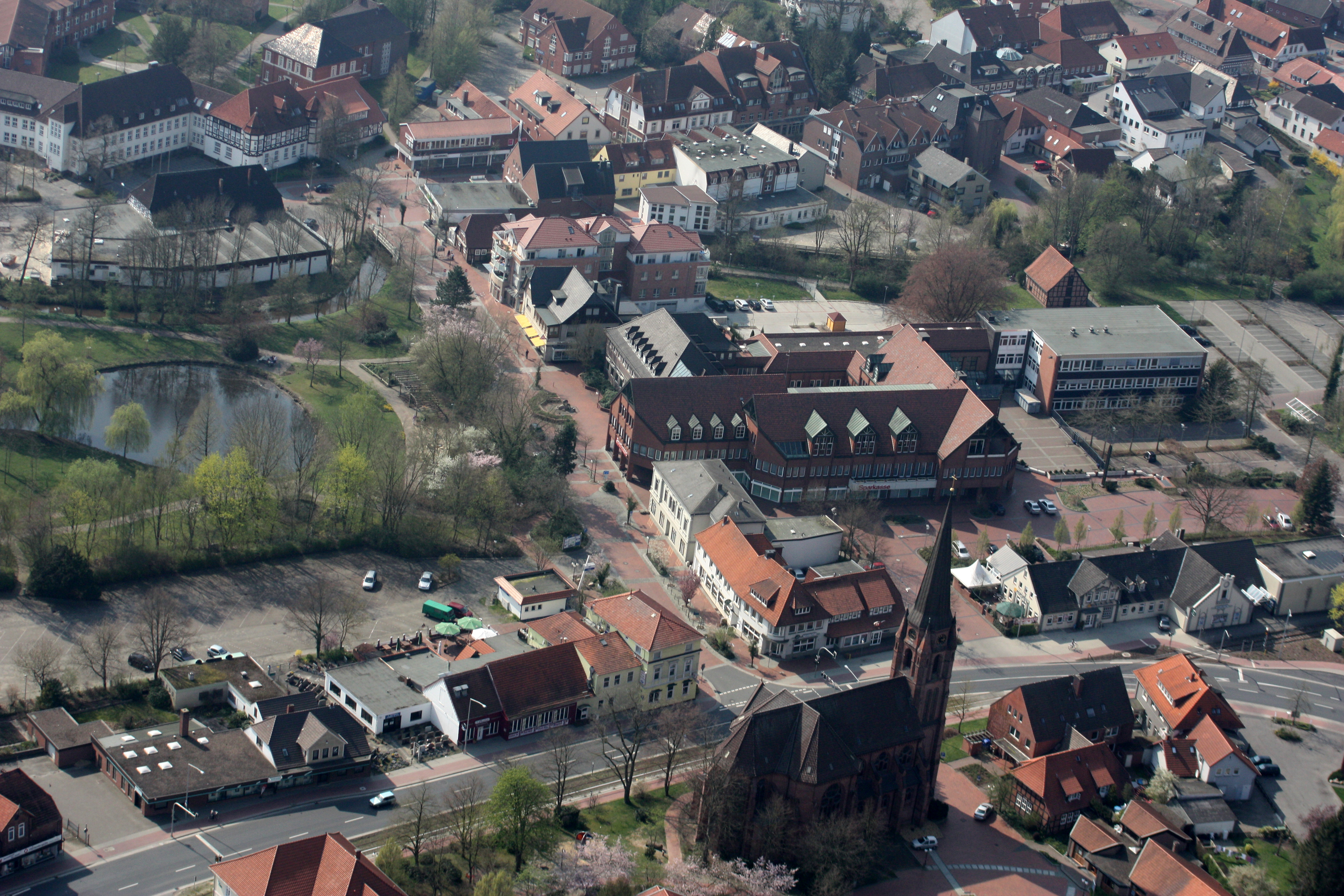 Syke, Landkreis Diepholz, Niedersachsen; Luftbilder